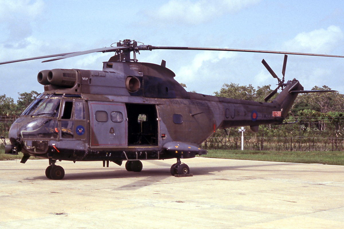 XW213, (CJ), Westland Puma HC.1 (1116), RAF, 1563 Flight, RAF Belize, 13/08/1991